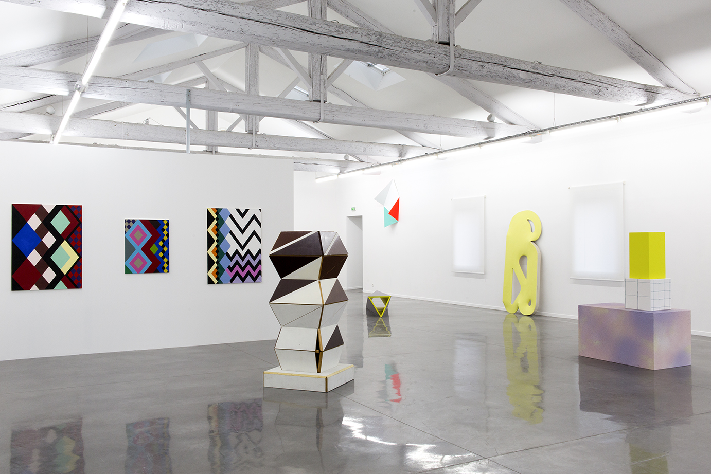 Flatland / Abstractions narratives #1, vue de l’exposition au Mrac Occitanie/ Pyrénées-Méditerranée, Sérignan, 2016. Photographie Cedrick Eymenier